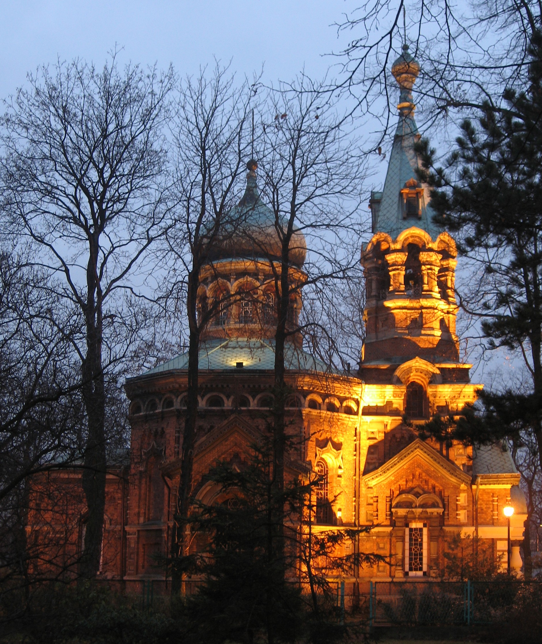 Cerkiew pw. Wiary, Nadziei i Miłości w Sosnowcu